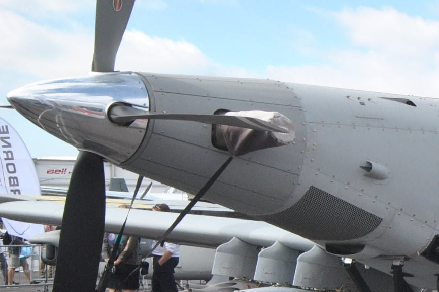 Paris Air Show 2017 Lasa Thrush 510G